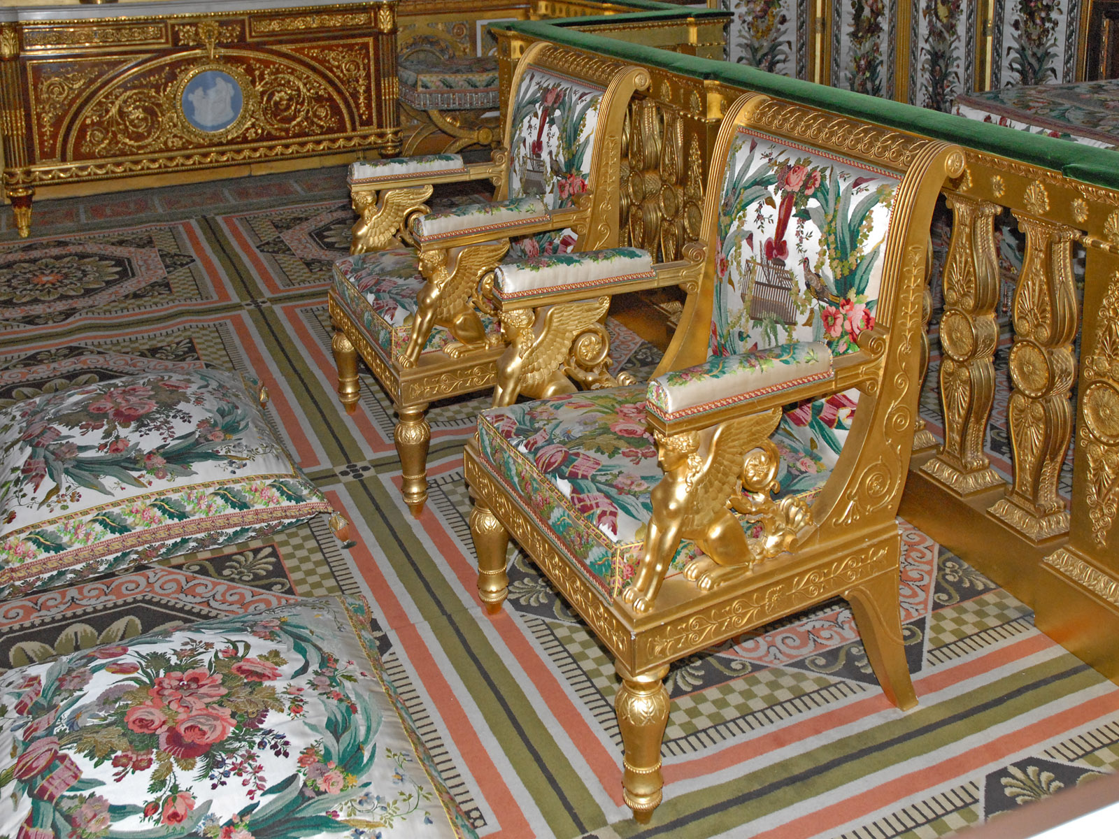 Chateau de Fontainebleau, France Chambre de l'Impératrice, détail, Depuis la Reine Marie de Médicis jusqu'à l'Impératrice Eugénie, toutes les souveraines occupèrent cette chambre. Le décor actuel correspond à différentes époques. Le mobilier est celui que connut l'Impératrice Joséphine. Le lit fut exécuté pour Marie-Antoinette qui n'eut pas le temps de l'utiliser. La soierie des murs et du mobilier a été retissée à Lyon de 1968 à 1986 d'après les modèles du 18ème siècle. Les fauteuils d'apparat sont attribués à Jacob Frères. Le château de Fontainebleau offre le souvenir de plus de 700 ans de présence des souverains de France, de l’intronisation de Louis VII en 1137 à la chute du Second Empire en 1870.